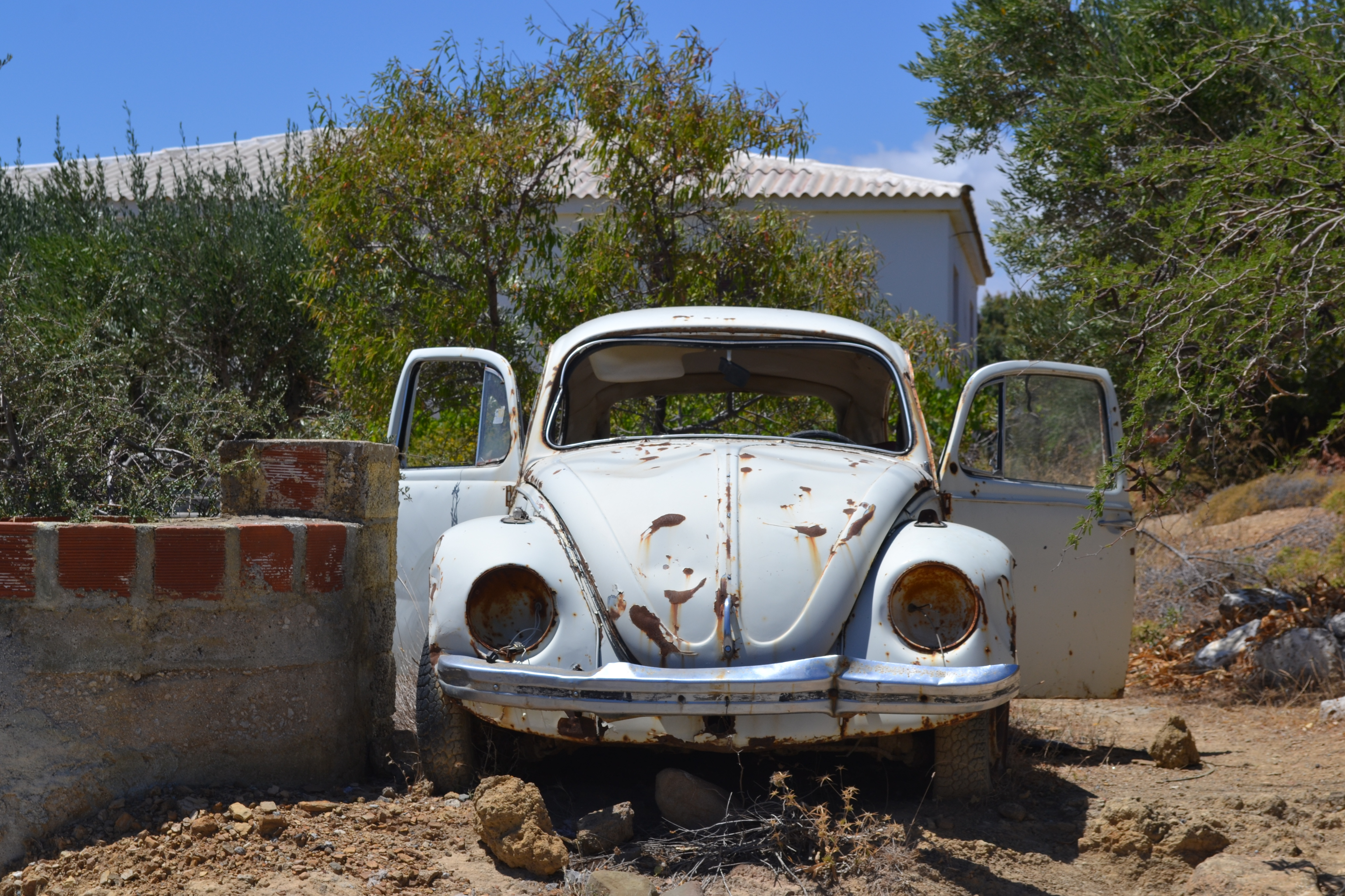 Abandoned Volkswagen in Karpathos